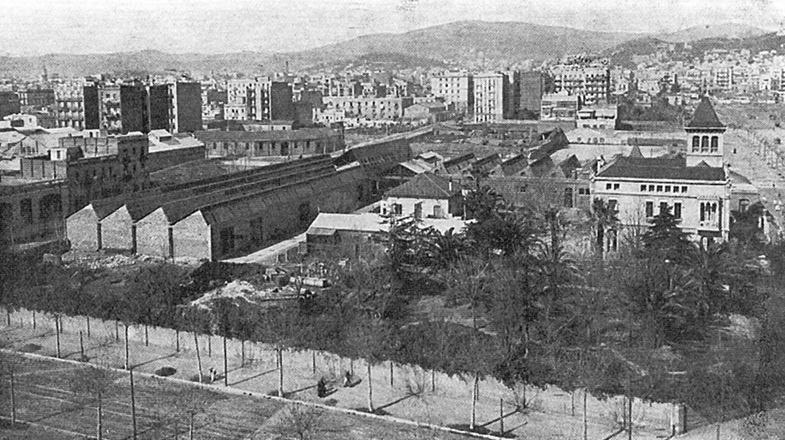 Fàbrica Elizalde (Imatge de 1921)